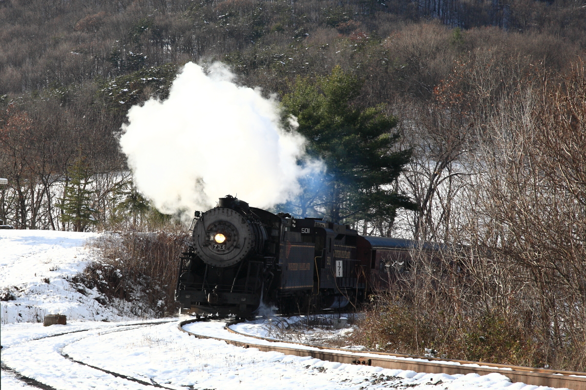 西馬里蘭觀光鐵路列車由734號蒸汽機車牽引，經過賀姆斯提特彎